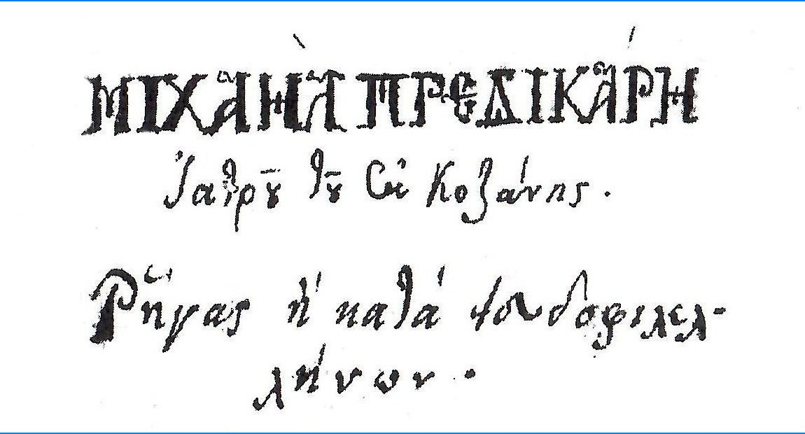 Τμήμα από την πρώτη σελίδα του χειρογράφου με τίτλο «Ρἥγας ἤ κατά ψευδοφιλελλήνων». Ο συγγραφέας, ιατρός Μιχαήλ Πρεδικάρης, το έγραψε το 1811.